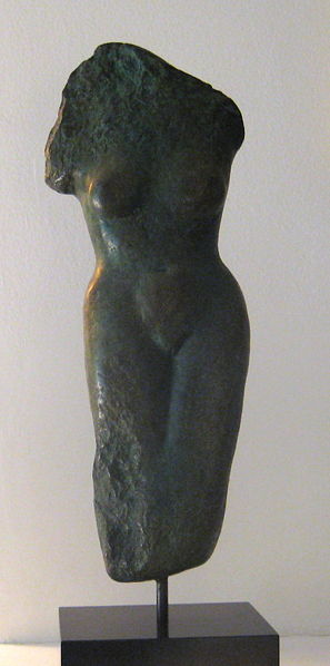 La Méditerranée